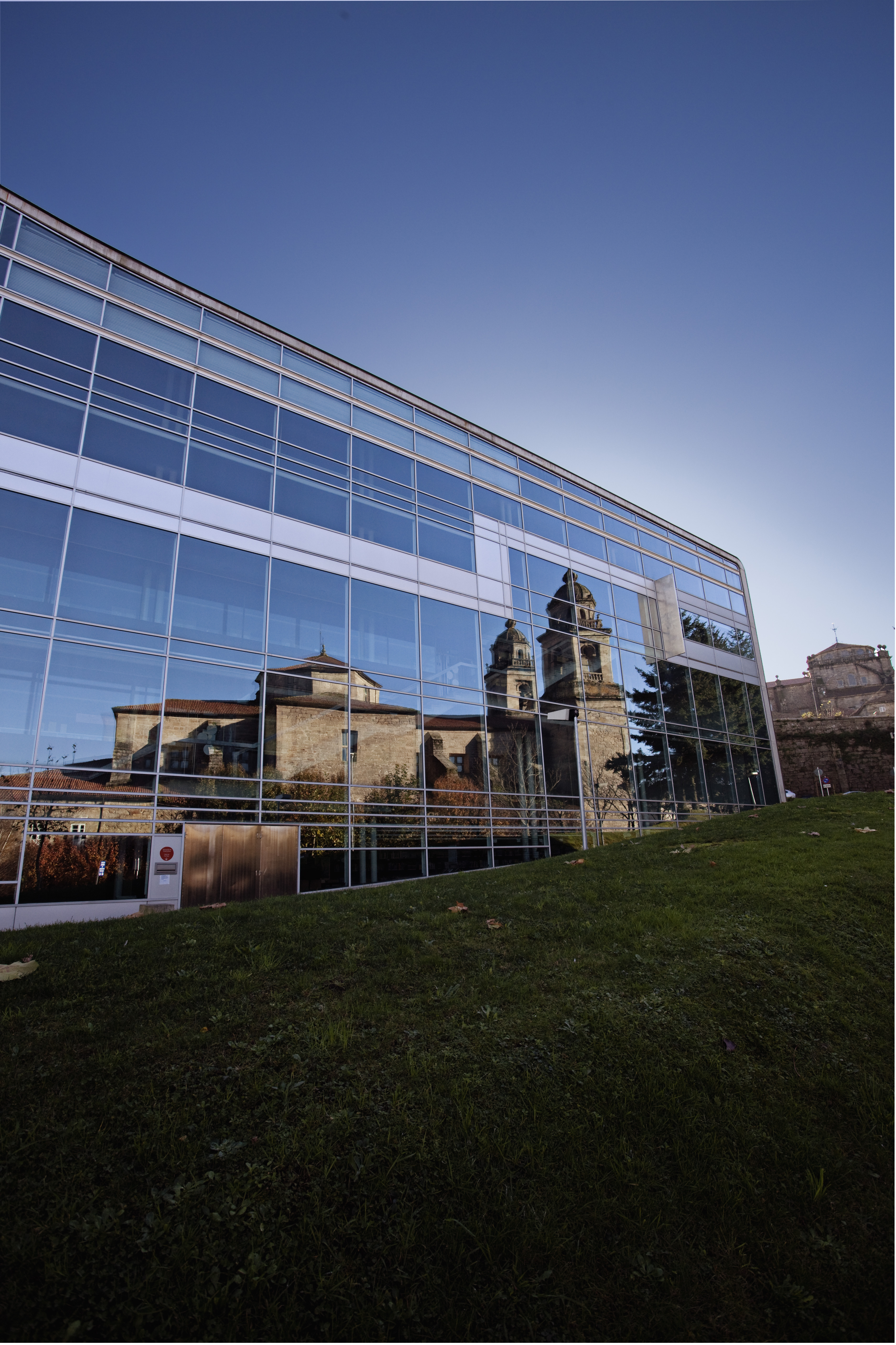 Igrexa de San Francisco: Biblioteca Anxel Casal